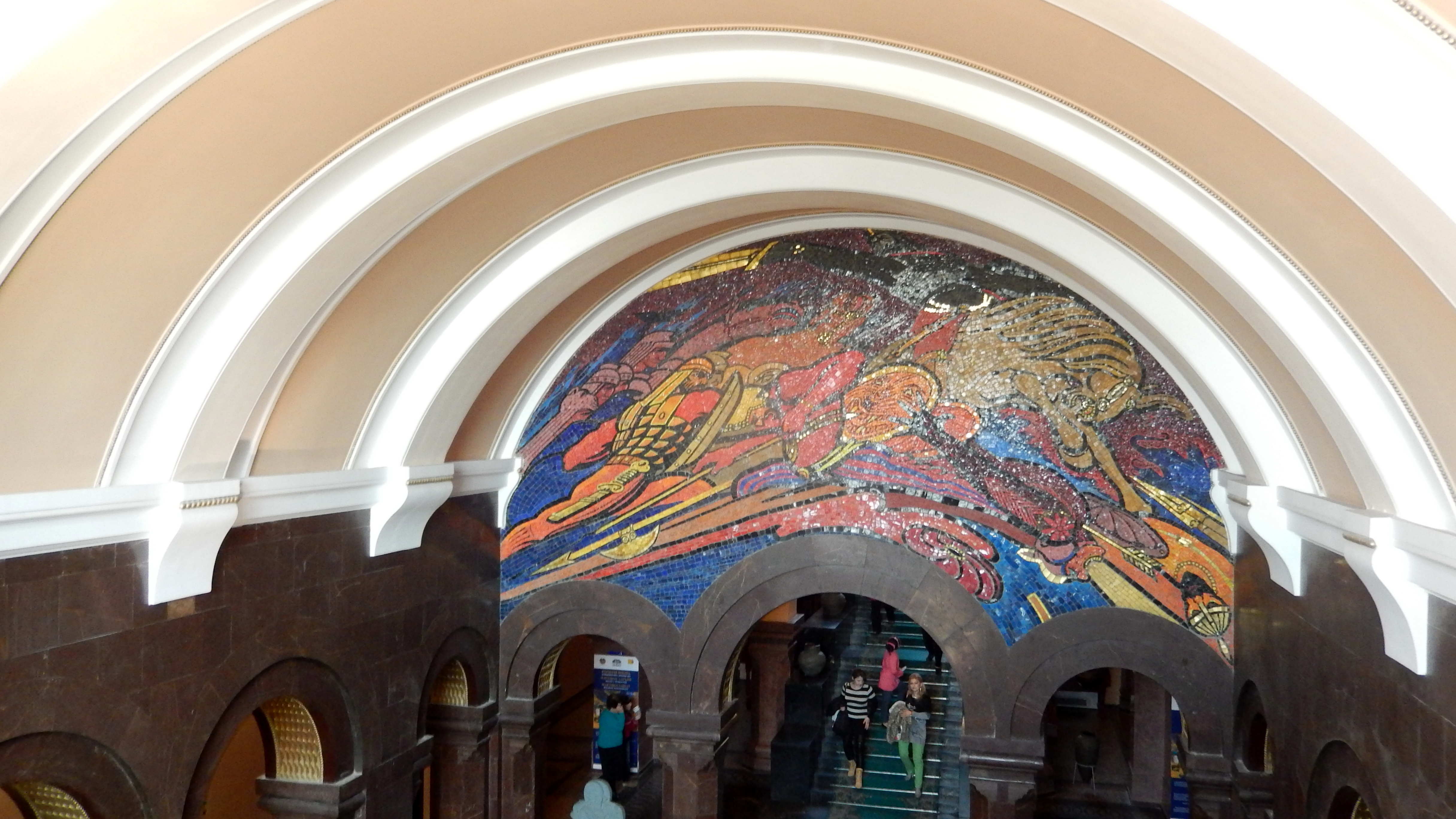 Մատենադարան, Որմնանկարներ 6/81.2